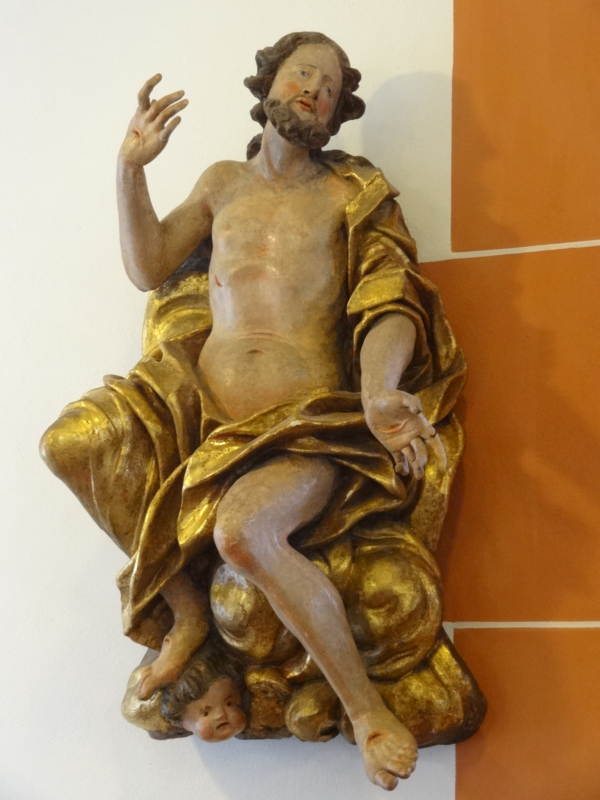 Stadtkirche zum Heiligen Geist (Nidda)